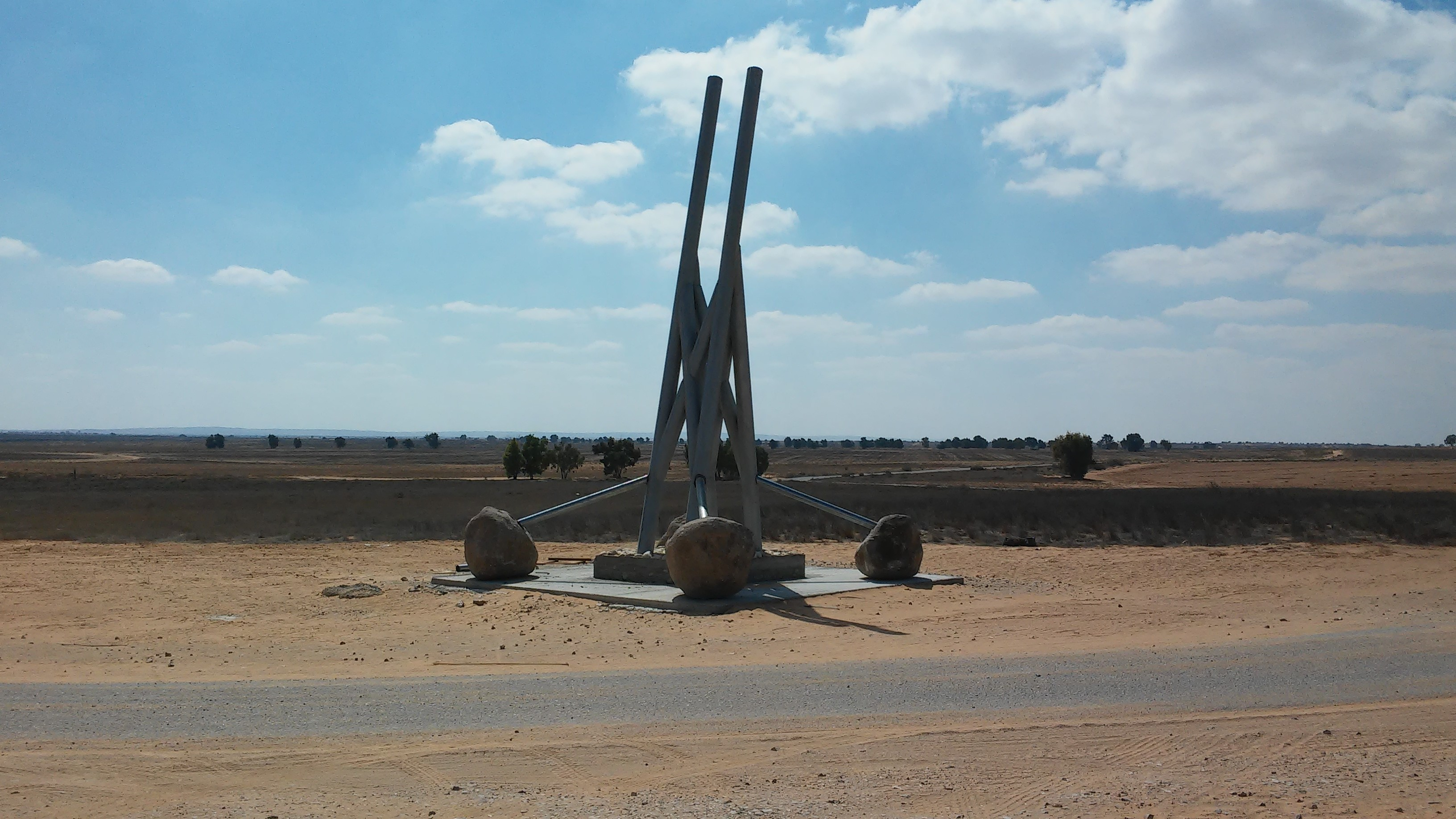 פסל על גבעת האירוסים בדרך השדות. הוקם ב-2016 לציון 70 שנה לעליית י"א הנקודות בנגב. הפסל הוא אברהם בורנשטיין מעין השלושה